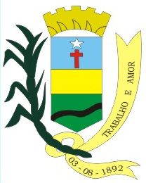 Brasão de Água Preta Pernambuco.